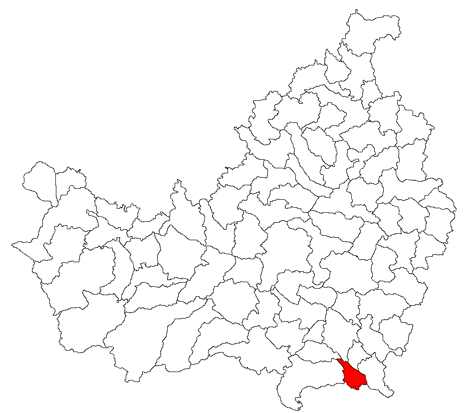 Categorie:Hărţi ale judeţului Cluj